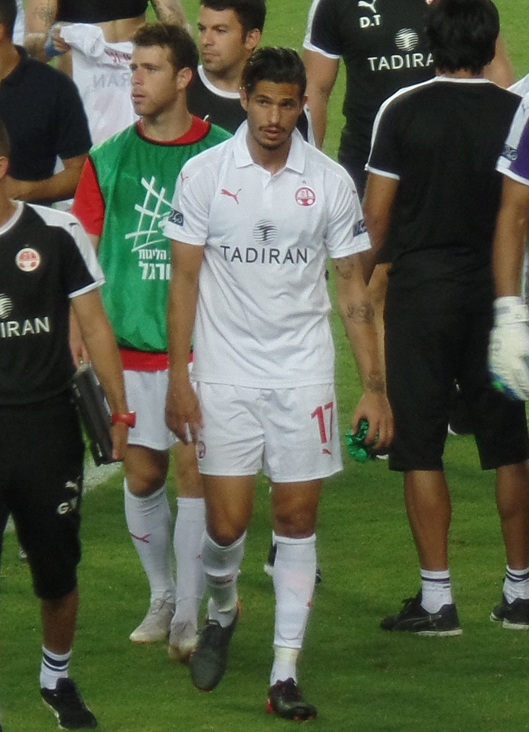 מתן אוחיון, 2018